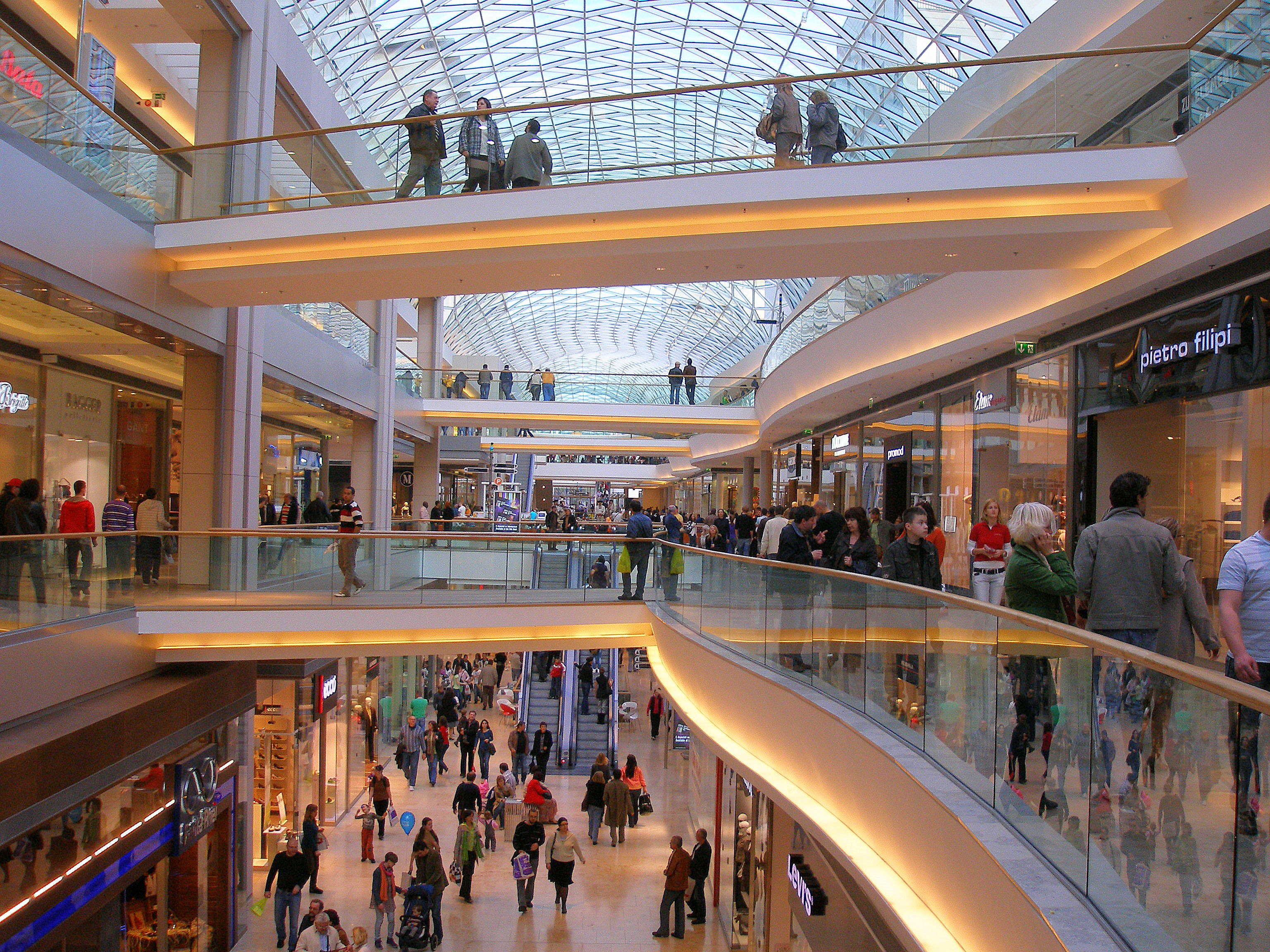 Bratislava. Nová bratislavská štvrť Eurovea. Interiér